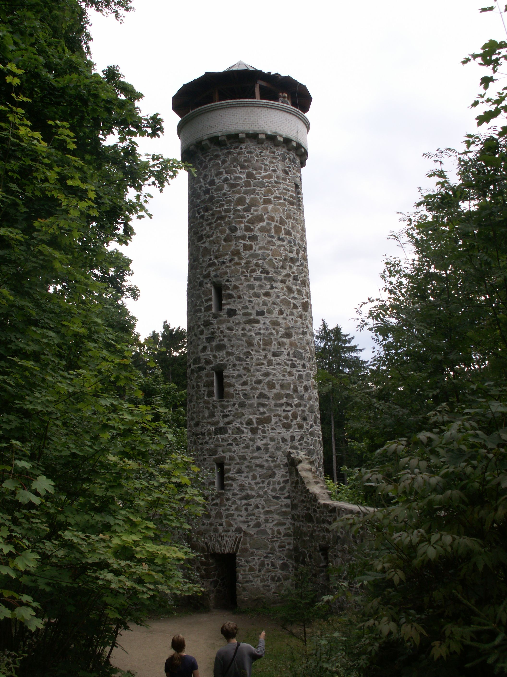 Rozhledna Hamelika u Mariánských Lázní